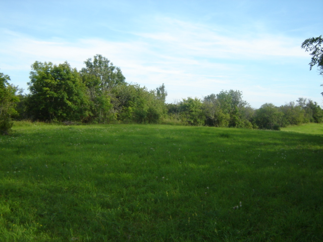 Asva linnusasula siseõu